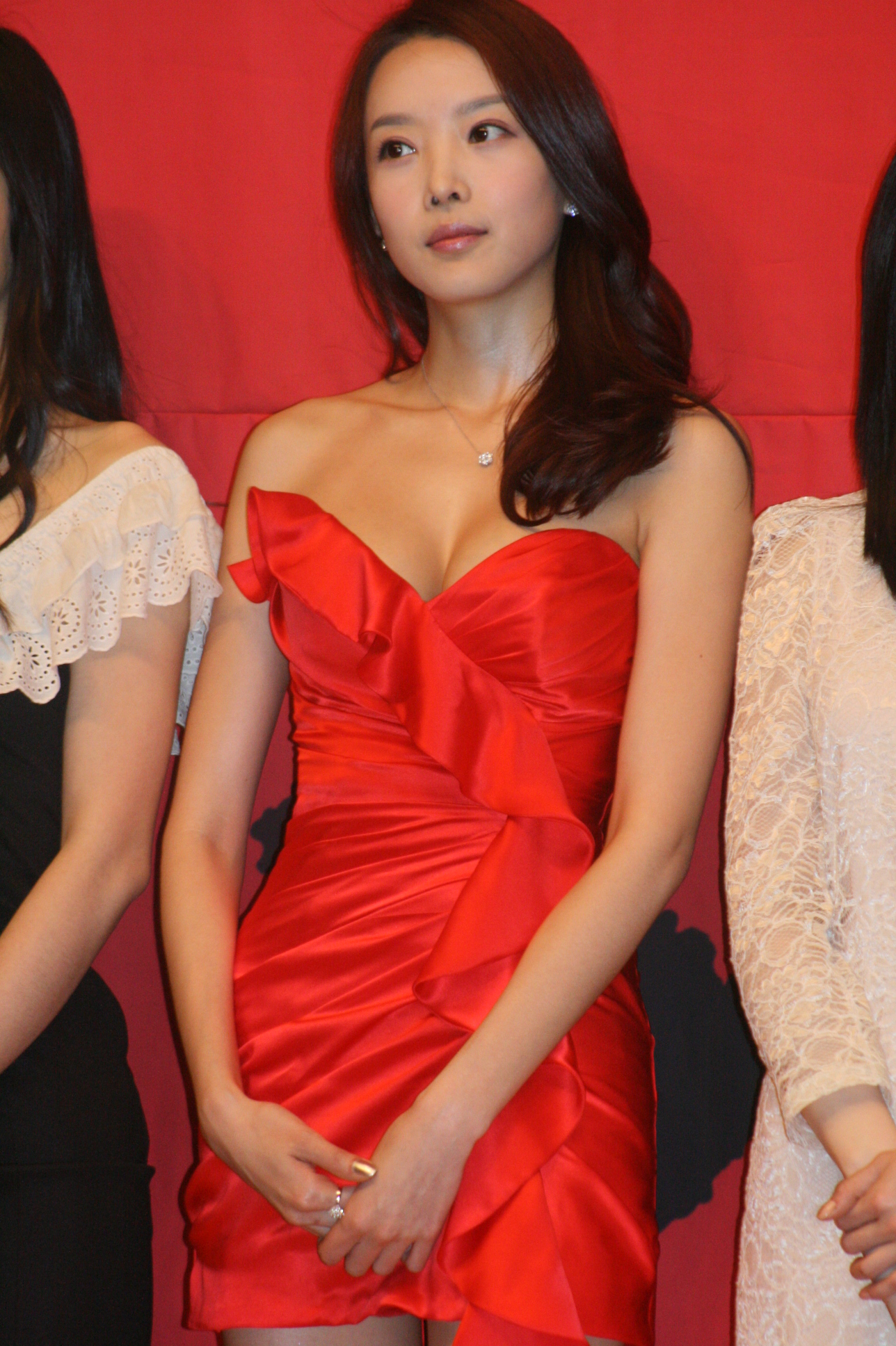 나쁜남자 제작발표회